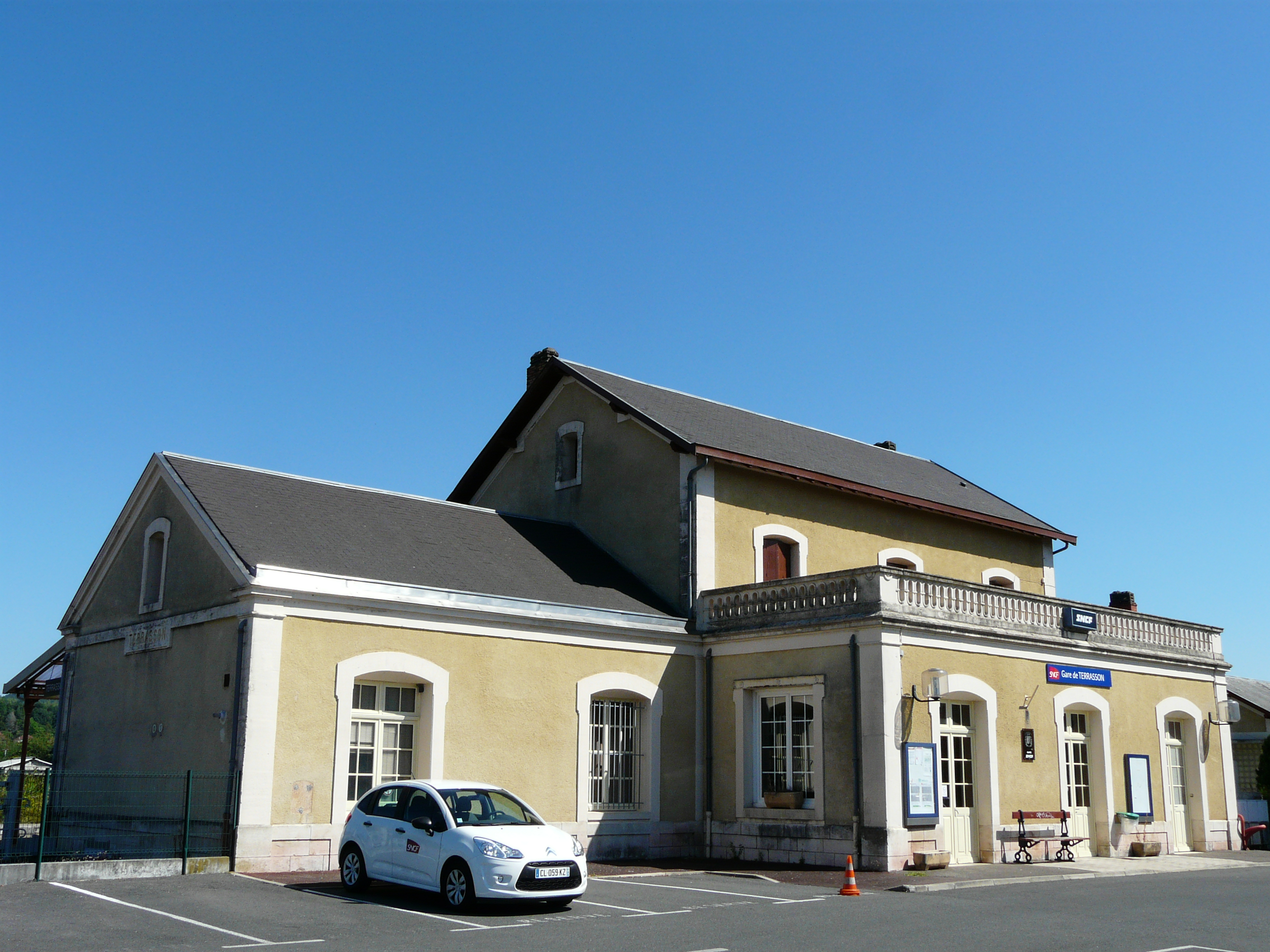 La gare de Terrasson-Lavilledieu, Dordogne, France.